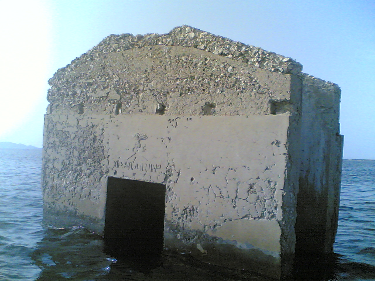 Battaglione Genio del XII Corpo d'Armata, Casamatta all'Idroscalo Marsala Stagnone Foto scattata da me stesso (Utente:Otrebla86), e, come si evince dai metadati, scattata il 19/08/06 con un Nokia 6630.